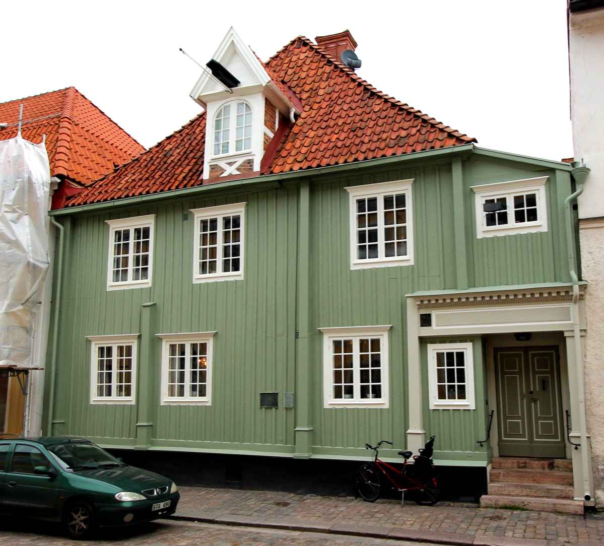 Wahlbomska huset är ett av de äldre bevarade trähusen i Kalmar. Uppkallat efter C.A. Wahlbom som förvärvade gården 1815. Under åren 1907 till 1936 beboddes Wahlbomska av J.Fred. Olson.